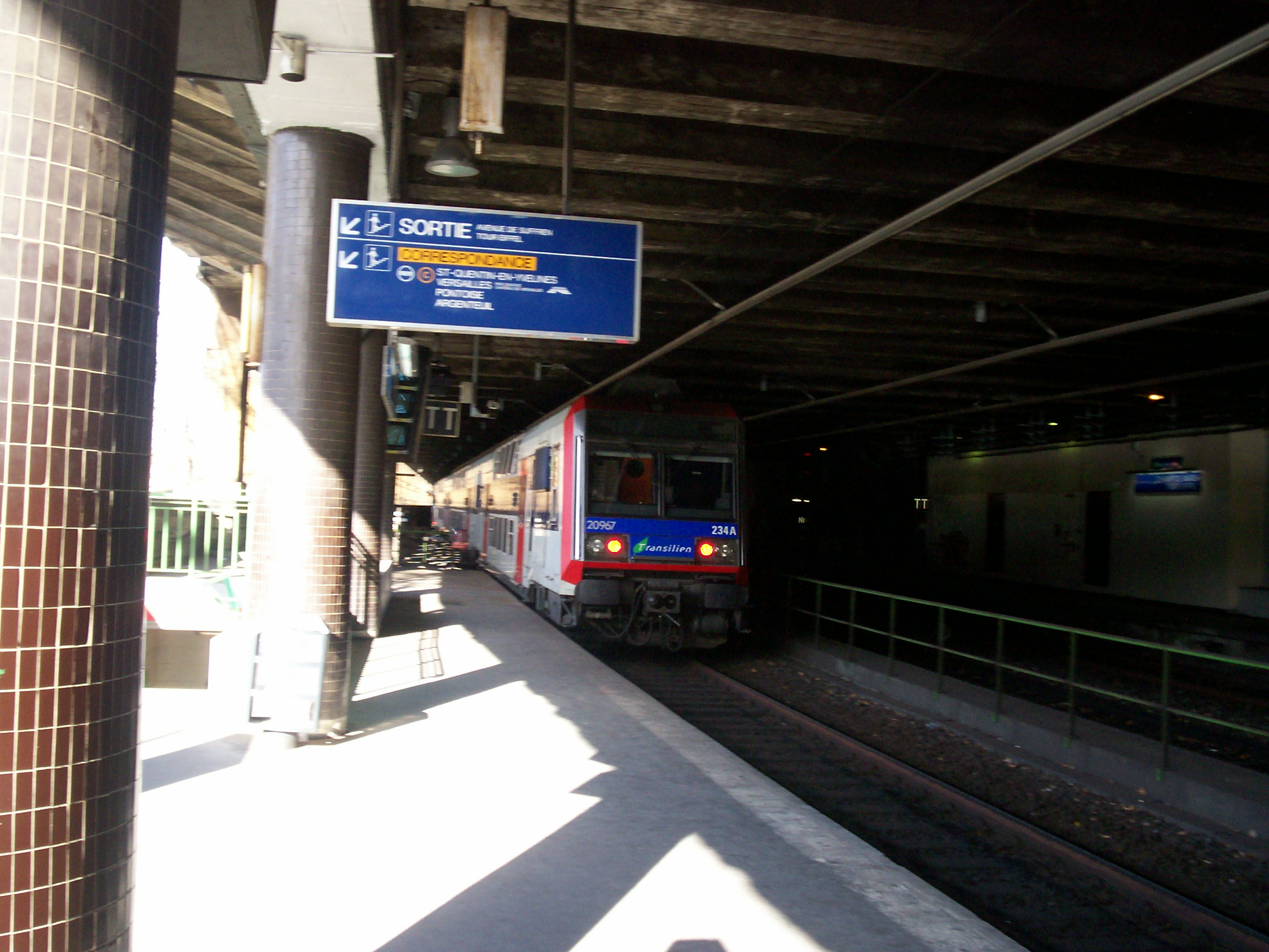 Gare de Champ de Mars - Tour Eiffel